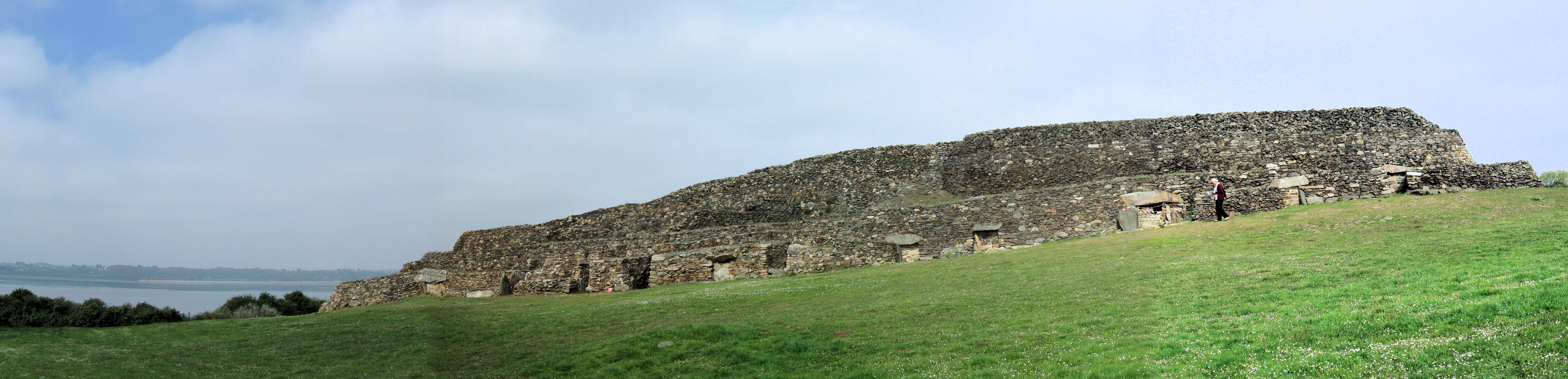 Cairn von Barnenez mit 11 Grabkammern, Ille-et-Vilaine, aus Südost